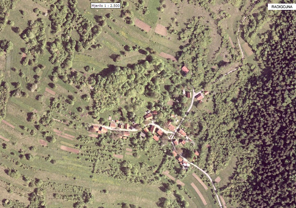 Orto foto